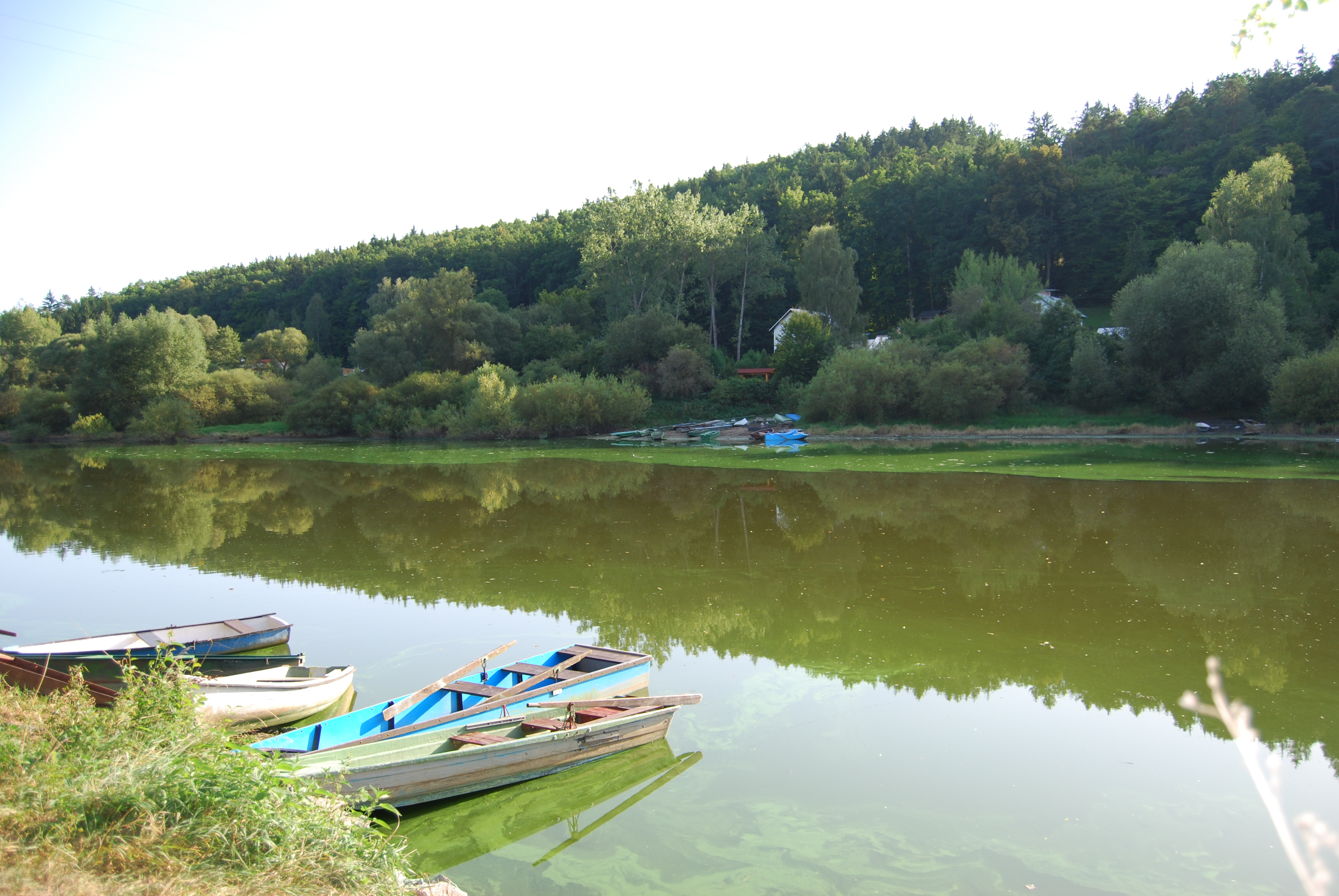 Pohled přes řeku Otavu na Jistec z chatové oblasti od Louky. Louka (Vojníkov). Okres Písek. Česká republika.